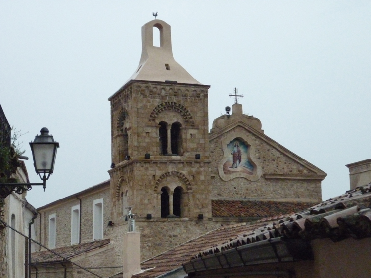 Chiesa madra Rocca Imperiale - Campanile e particolare della facciata